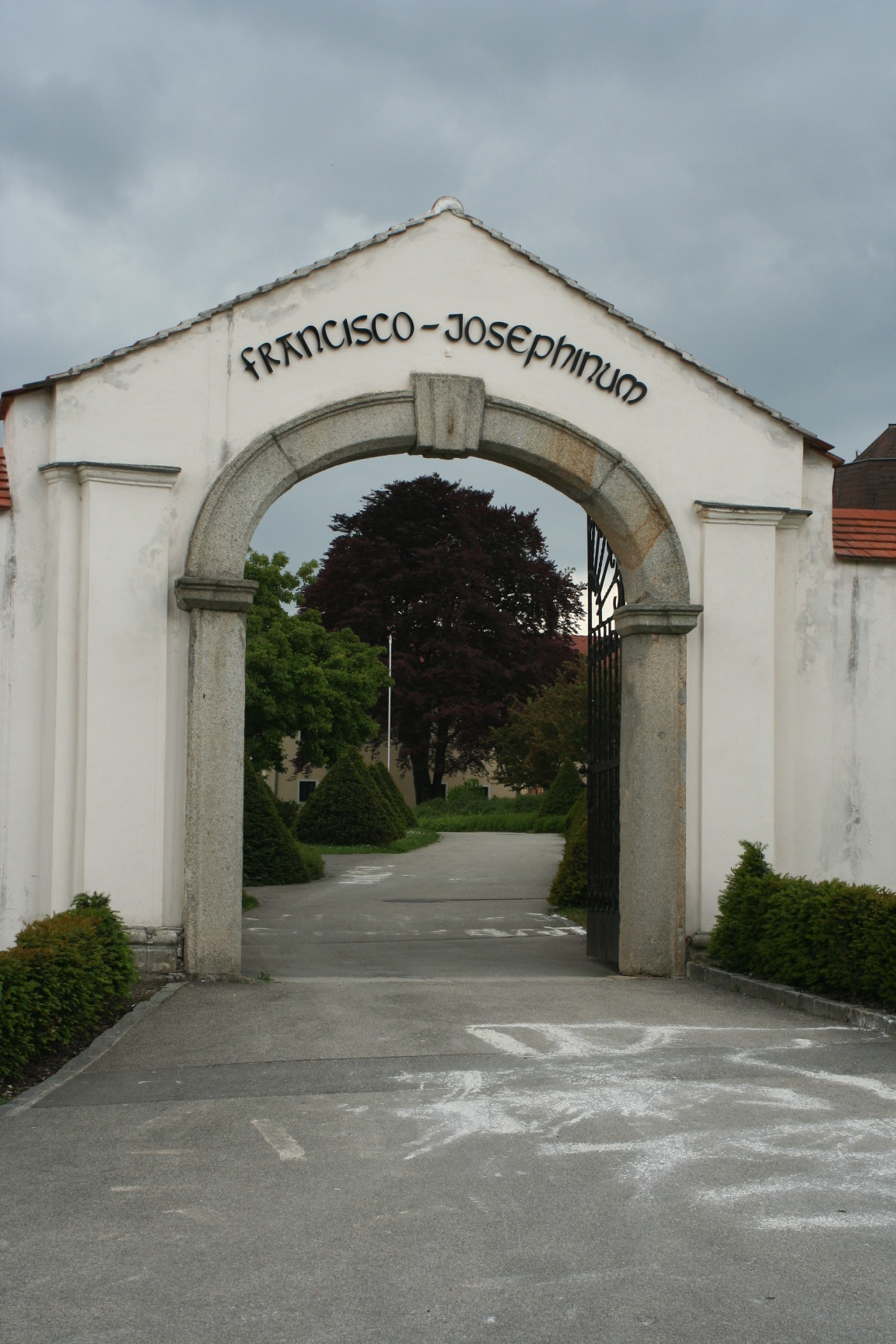 eingang zum fransisco josephinum in weinzierl, wieselburg